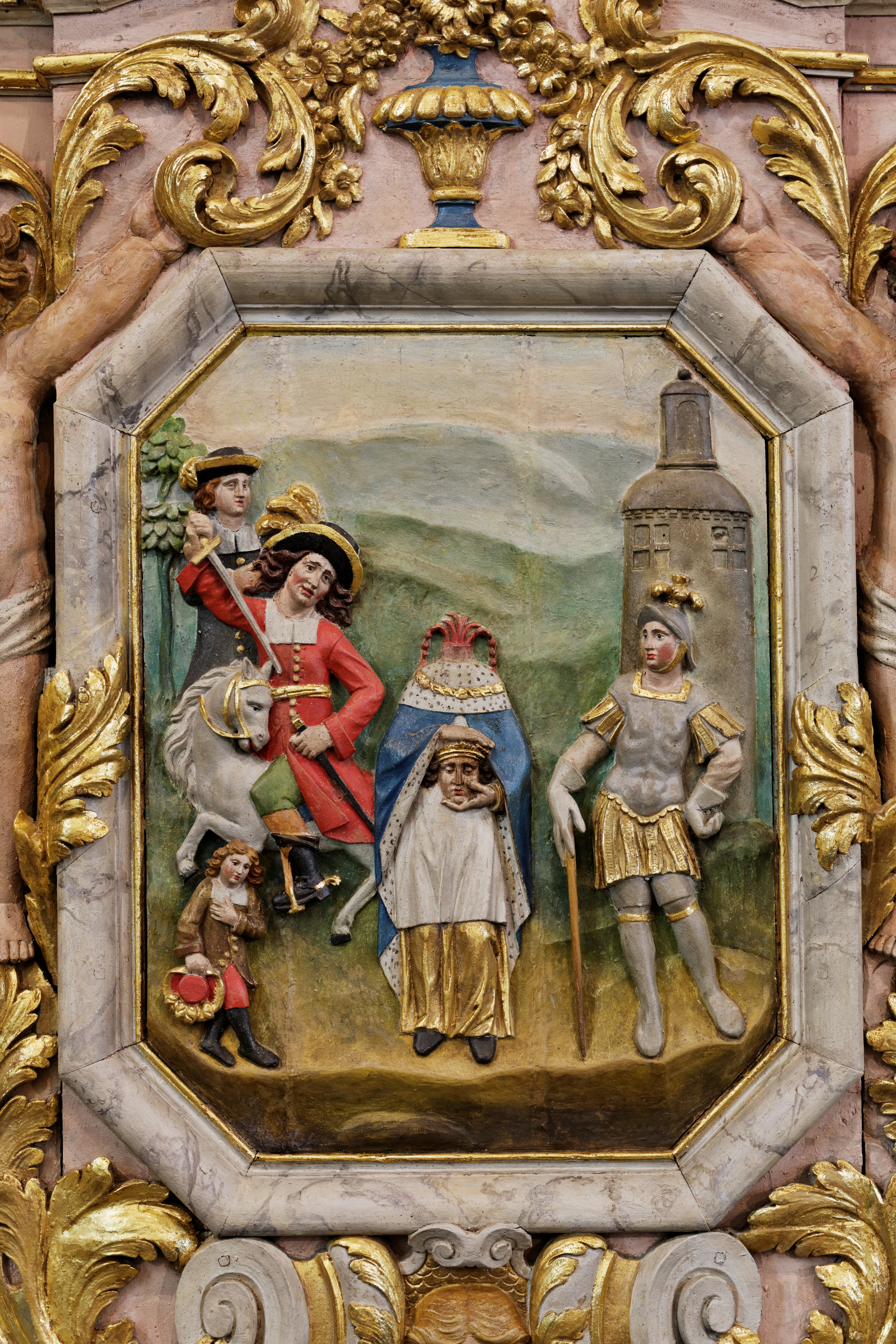 Martyre de Saint-Miliau. Retable de la Passion de léglise Notre-Dame de l'enclos paroissial de Lampaul-Guimiliau dans le Finistère..